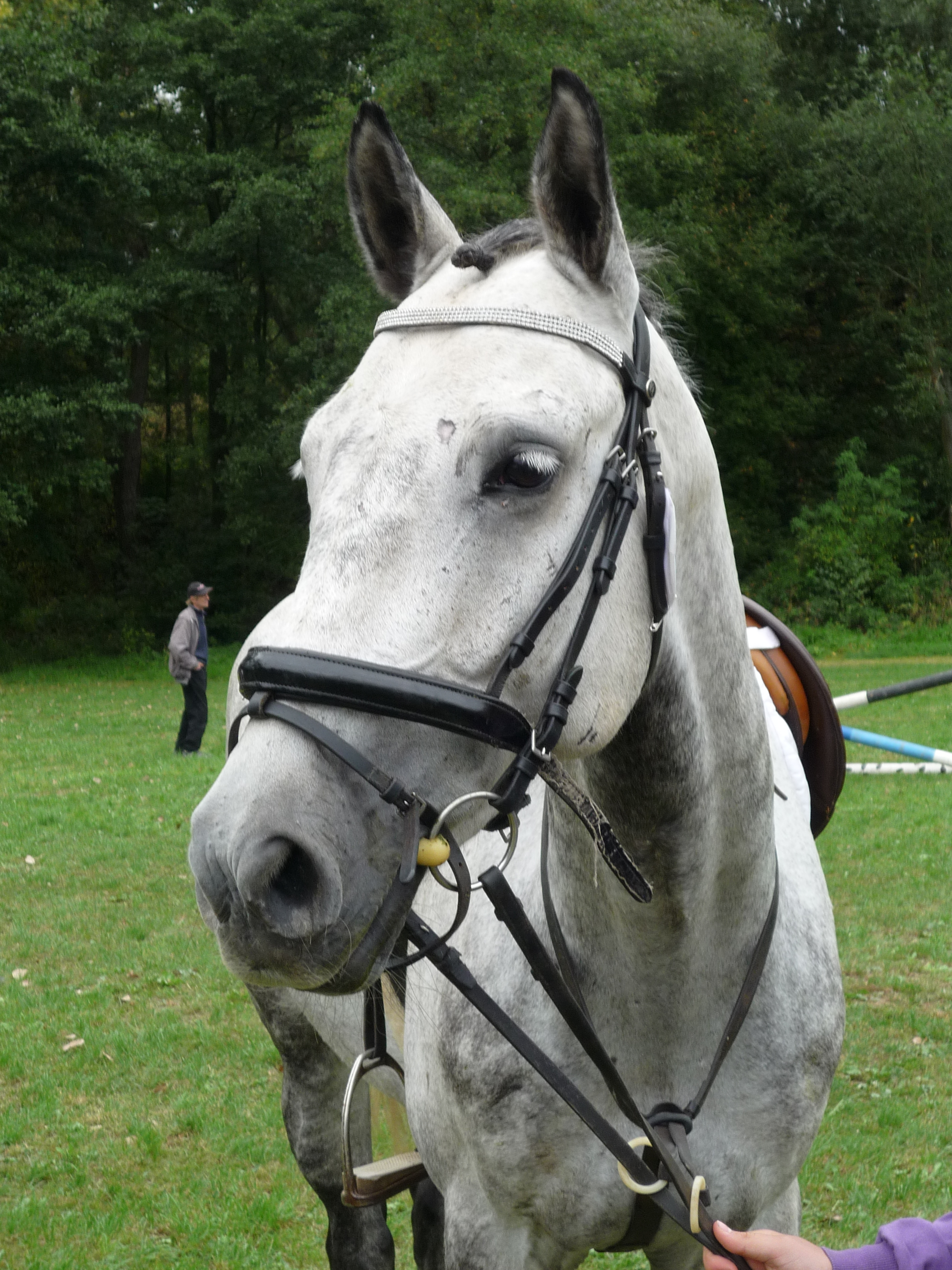 Autor fotografie Jiří Zelenka. Parkurové závody koní. Areál Žabinec (ulice Na Riviéře) . Akce se konala dne 18.9.2016 v Havlíčkově Brodě. Kraj Vysočina. Czech Republic